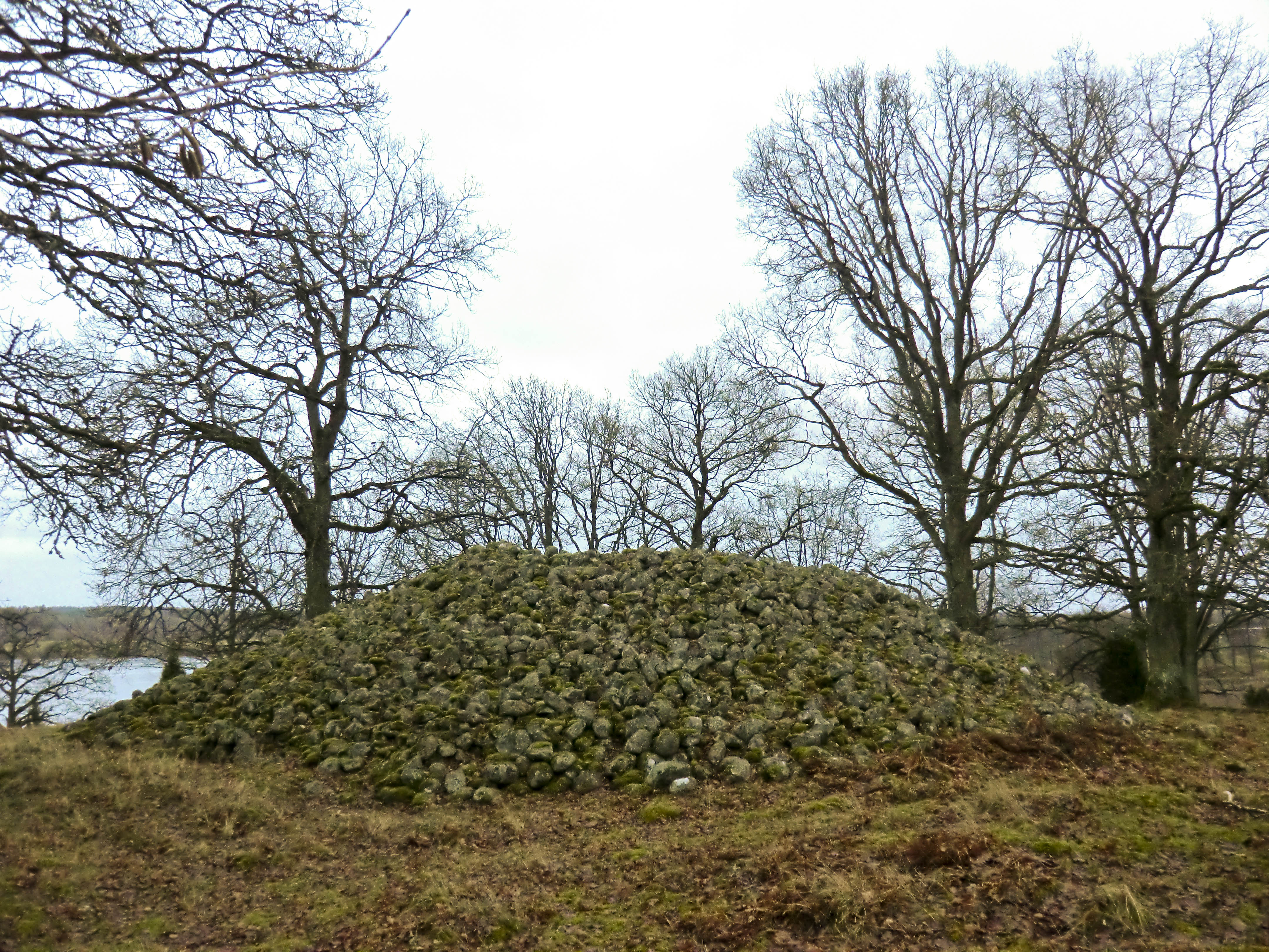 Kongshögen/Kongsgraven (Lekaryd 63:1)